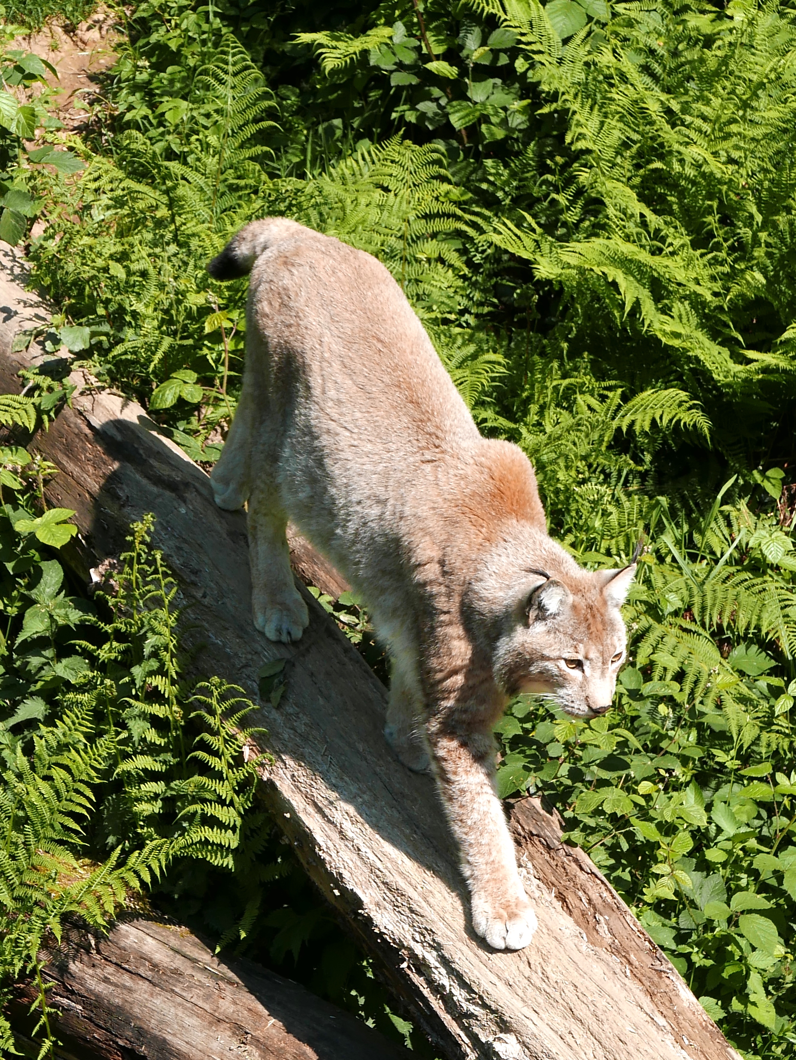 Europäischer Luchs im Schwarzwaldzoo Waldkirch, Landkreis Emmendingen